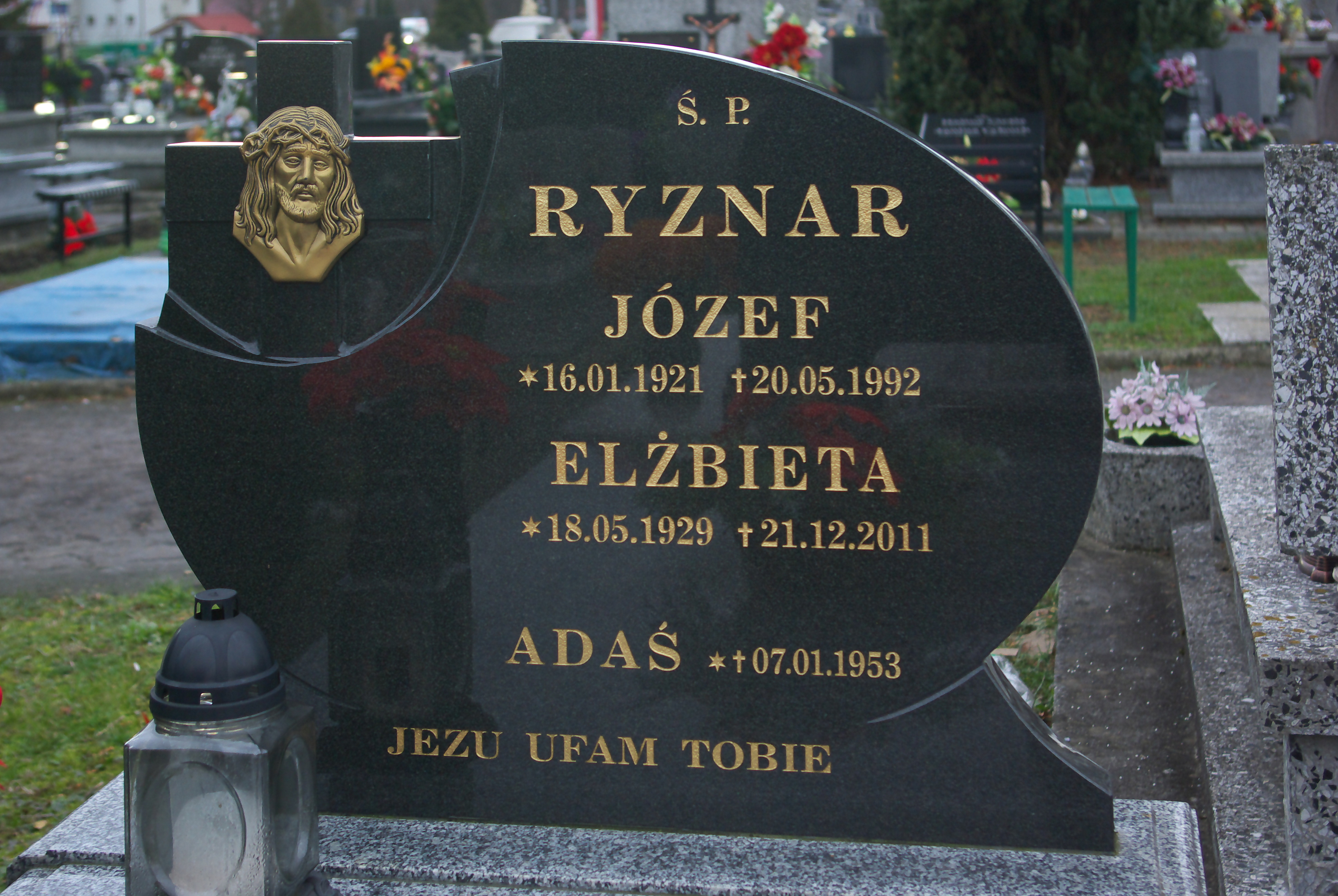 Grobowiec Elżbiety i Józefa Ryznarów na Cmentarzu Centralnym w Sanoku.